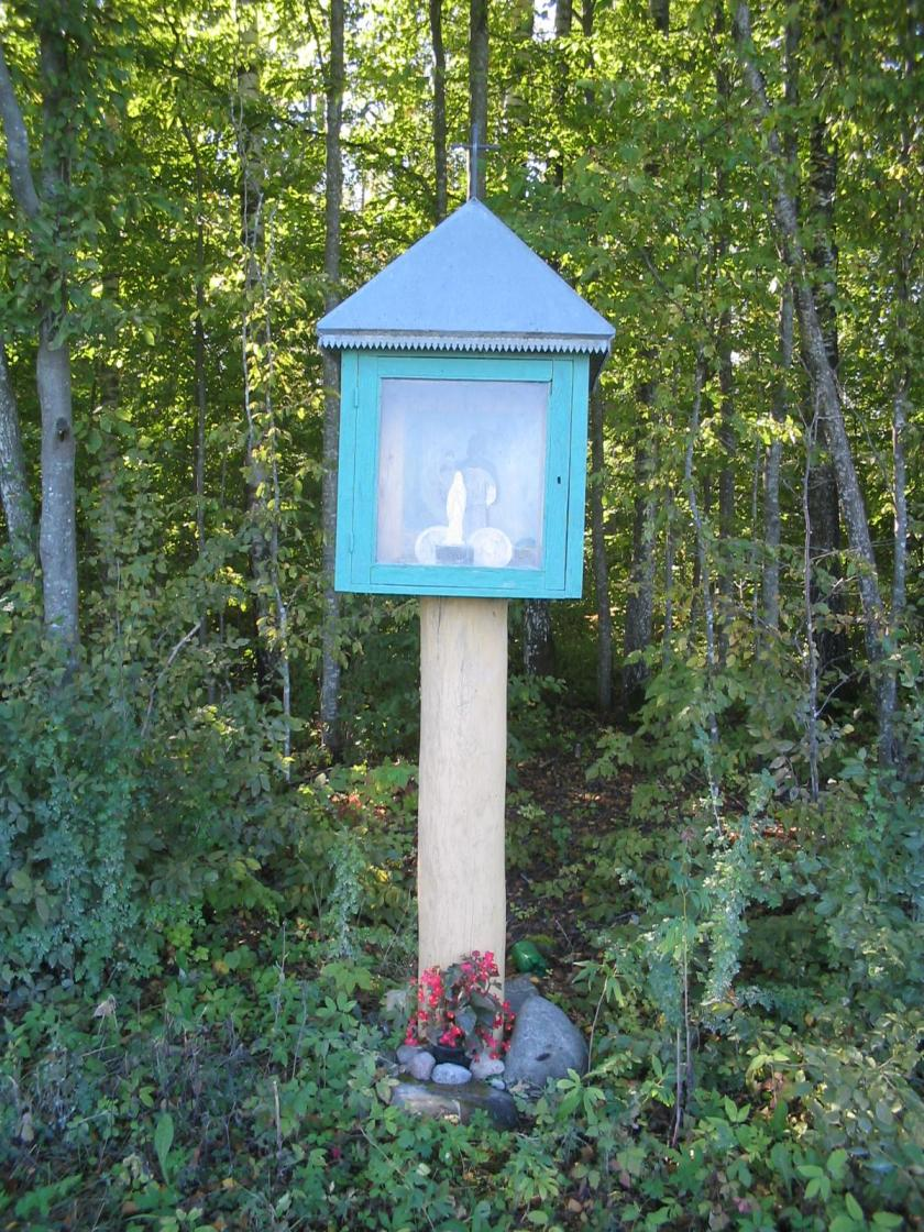 Stirpeikos koplytėlė